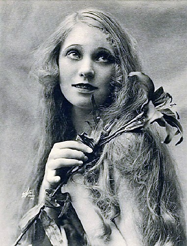 Maria Gambarelli